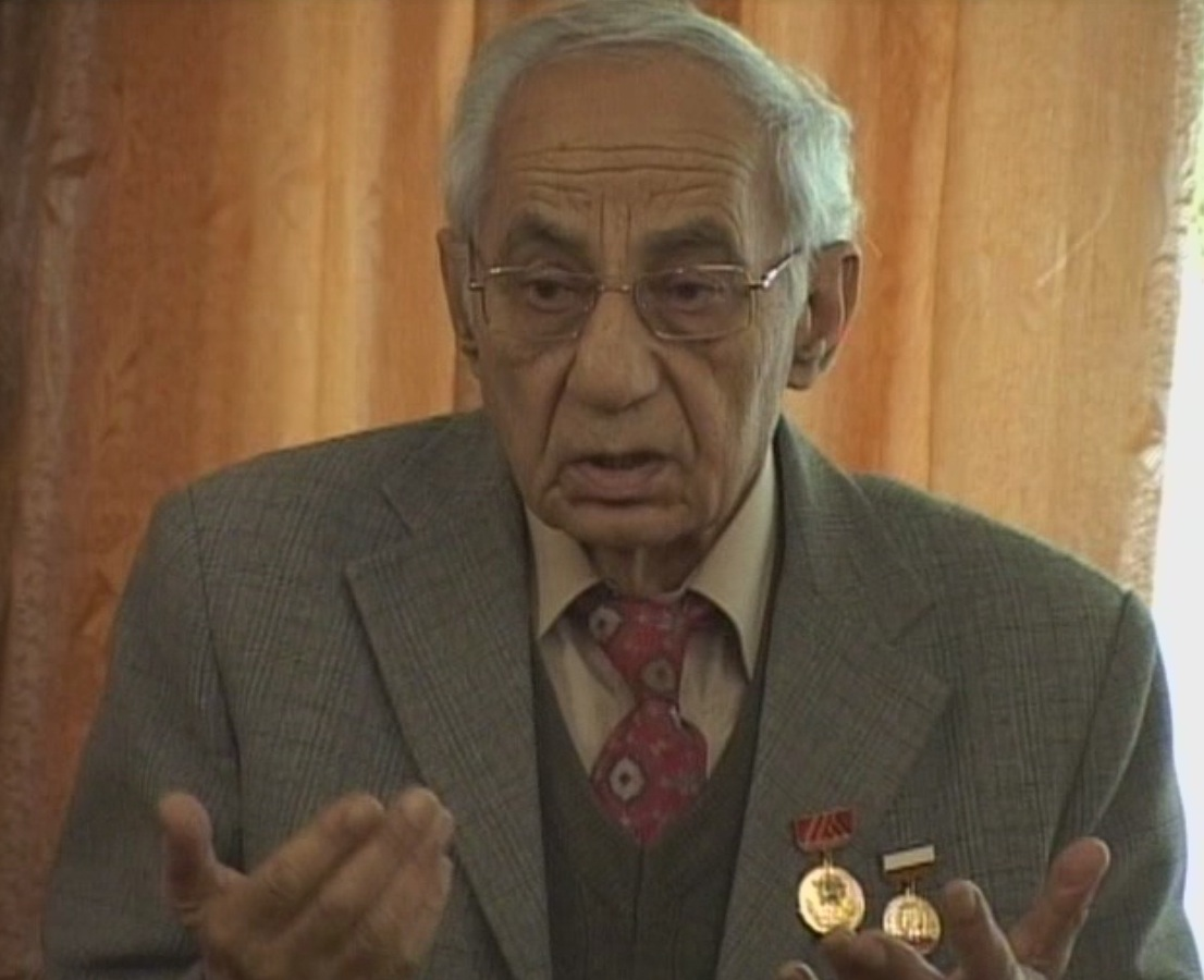 На этом снимке изображен писатель и поэт Георгий Меликов на презентации своей книги о Михаиле Лермонтове. Встреча проходила в Феодосийском доме культуры, в декабре 2011 года